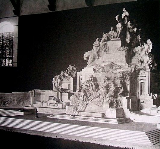 Projeto de Luigi Brizzolara para o Monumento à Independência. Maquete exposta no Palácio das Indústrias, em São Paulo, em 1920